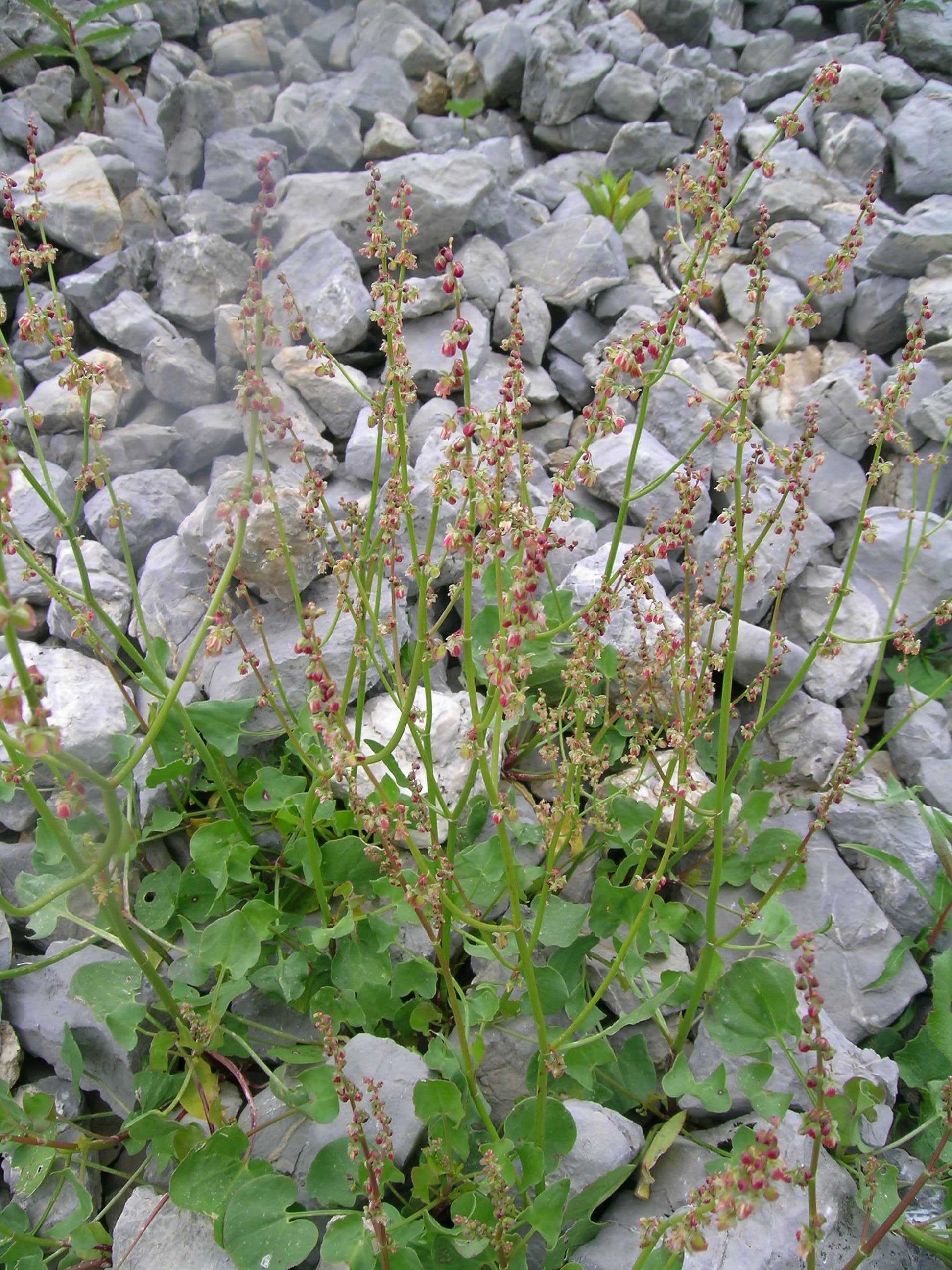 Rumex scutatus, Schynige Platte, Kanton Bern, Schweiz